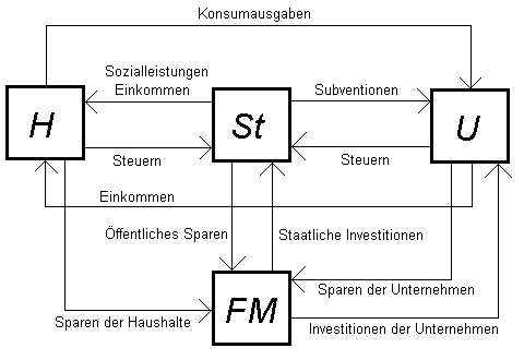 Wirtschaftskreislauf einer geschlossenen Volkswirtschaft